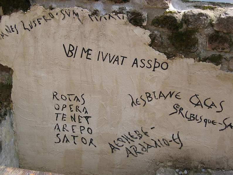 Freilichtmuseum Hechingen, lateinische Latrinensprüche